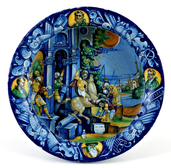 Coppa istoriata con il sacrificio di Marco Curzio. Bottega di Maestro Pietro Bergantini. Faenza 17 Giugno 1529